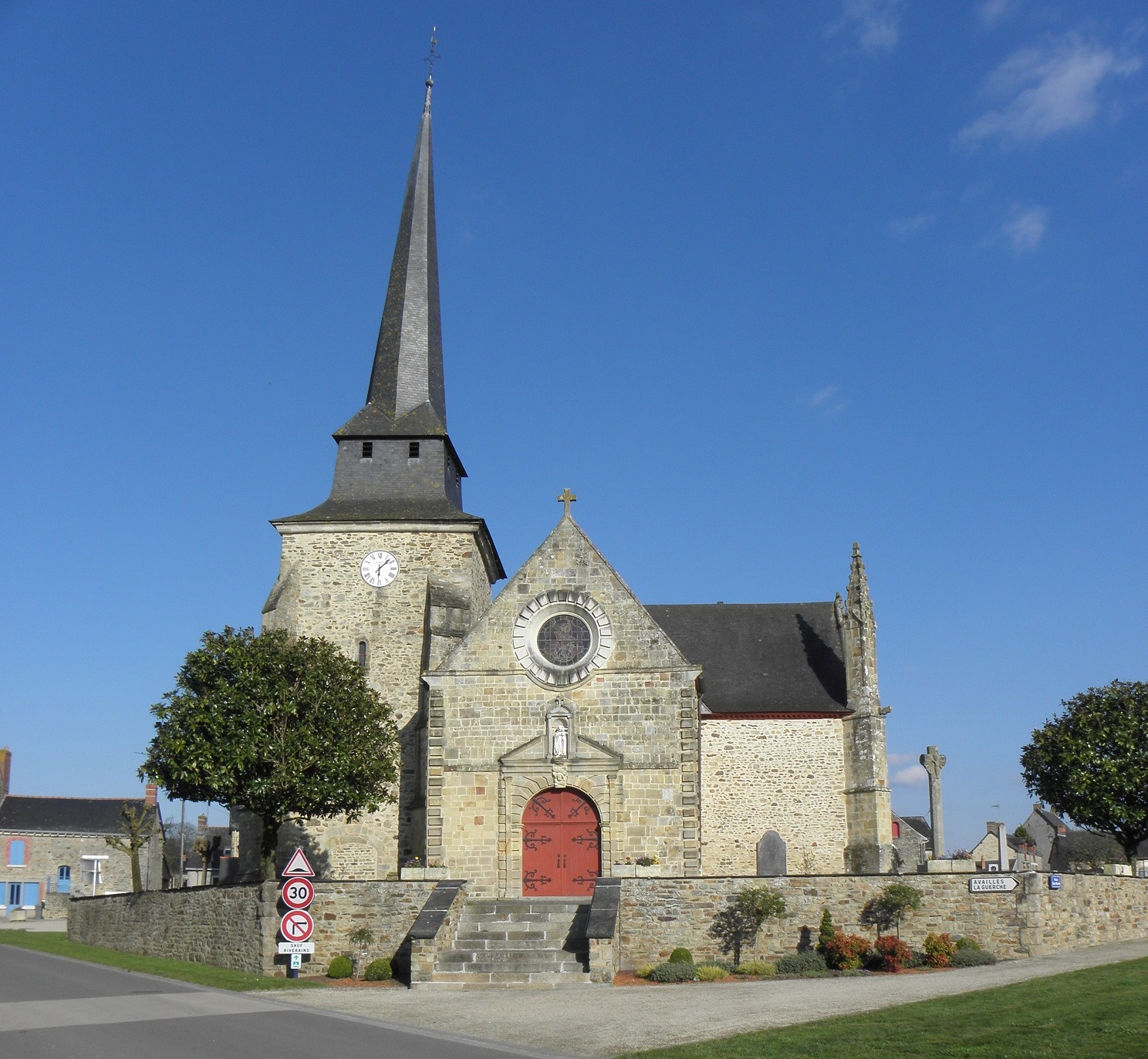 Église Saint-Martin de Moutiers (35). Façade occidentale.